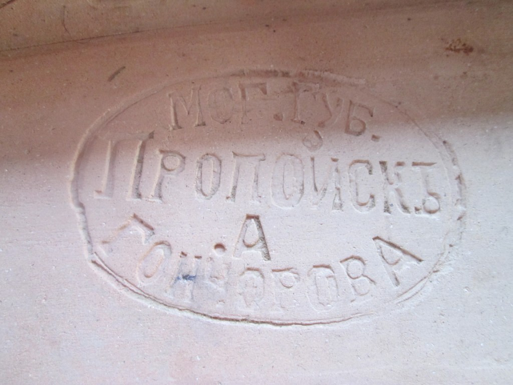 Вензеля на керамической плитке село мельгуны